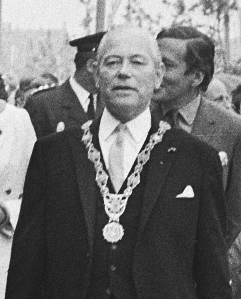 Prinses Beatrix en prins Claus worden rondgeleid door burgemeester Heusdens